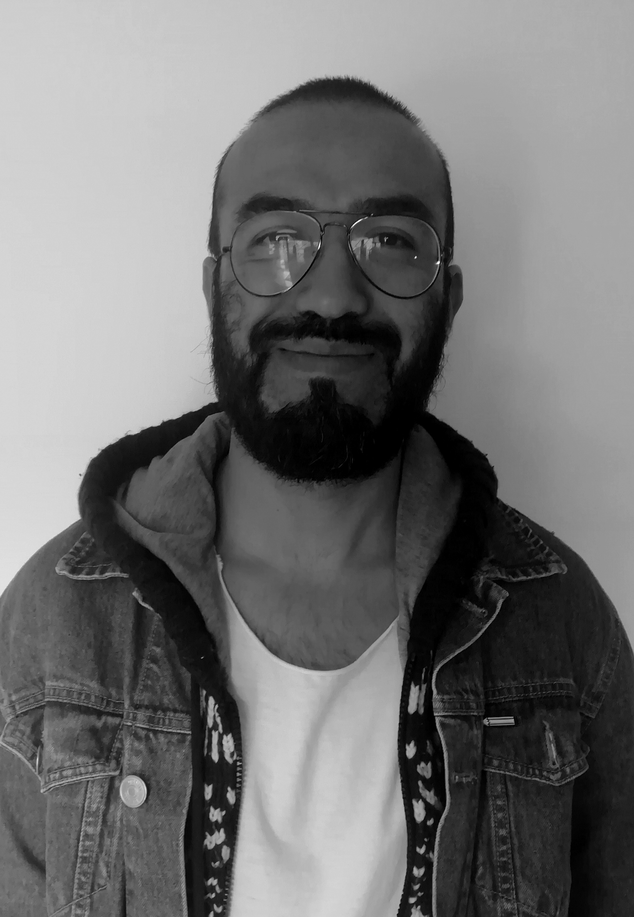 Fotografía del autor e ilustrador colombiano Dipacho